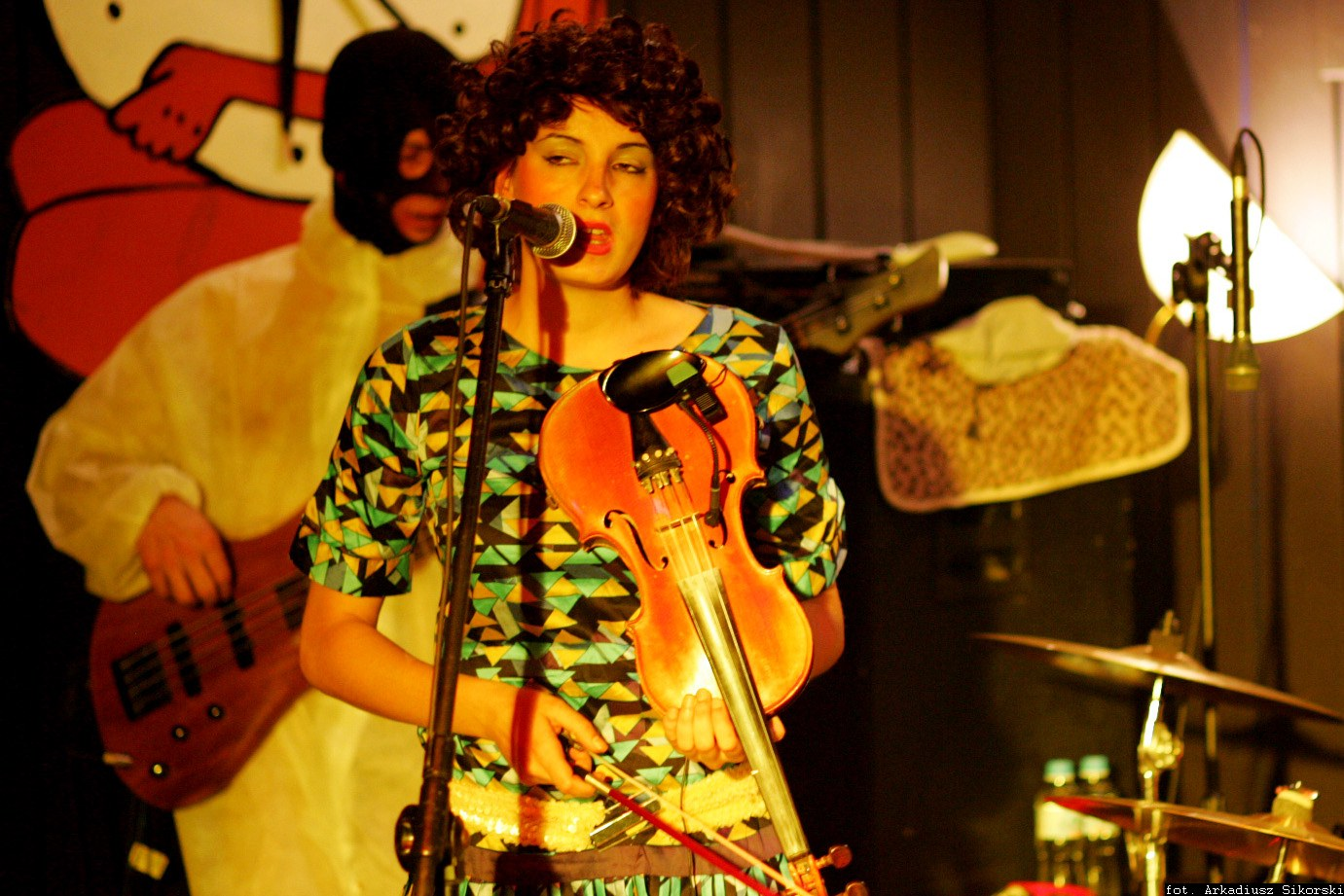 Kawałek Kulki in Klub Magnat in Gorzów Wielkopolski.